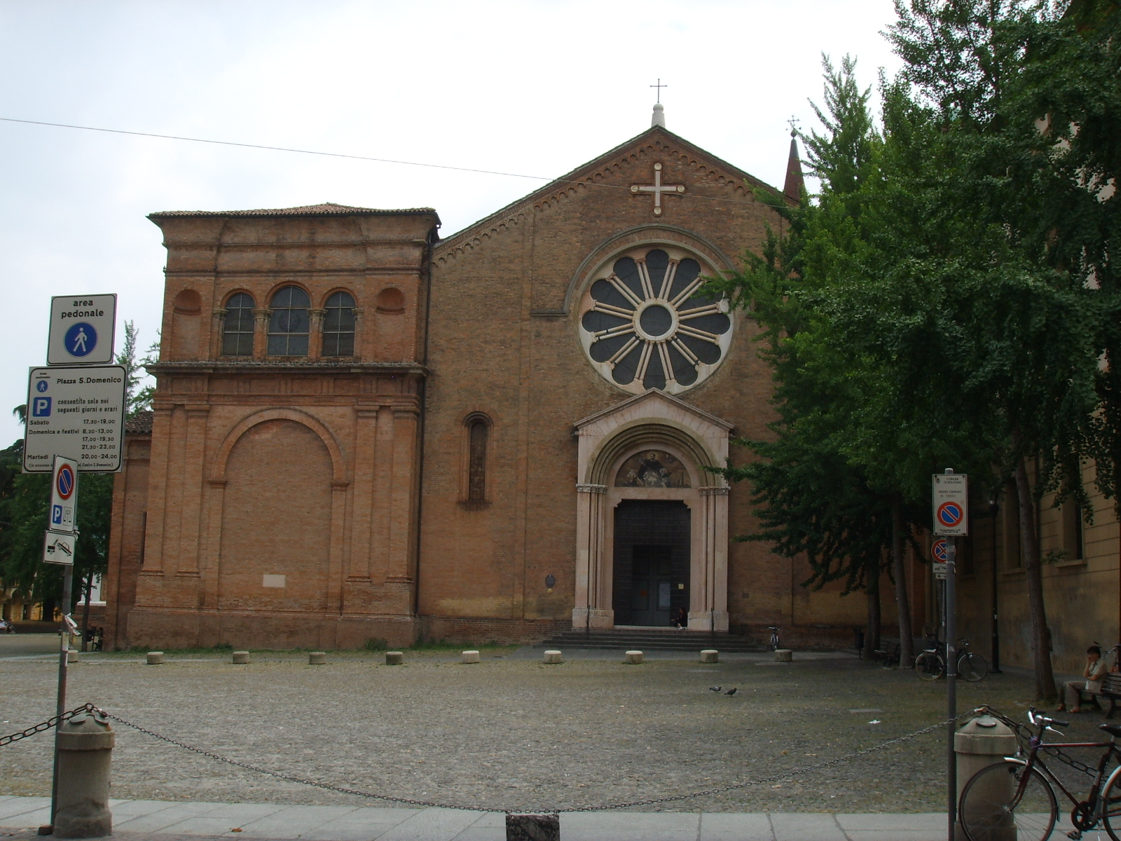 Bologna, san domenico, esterno